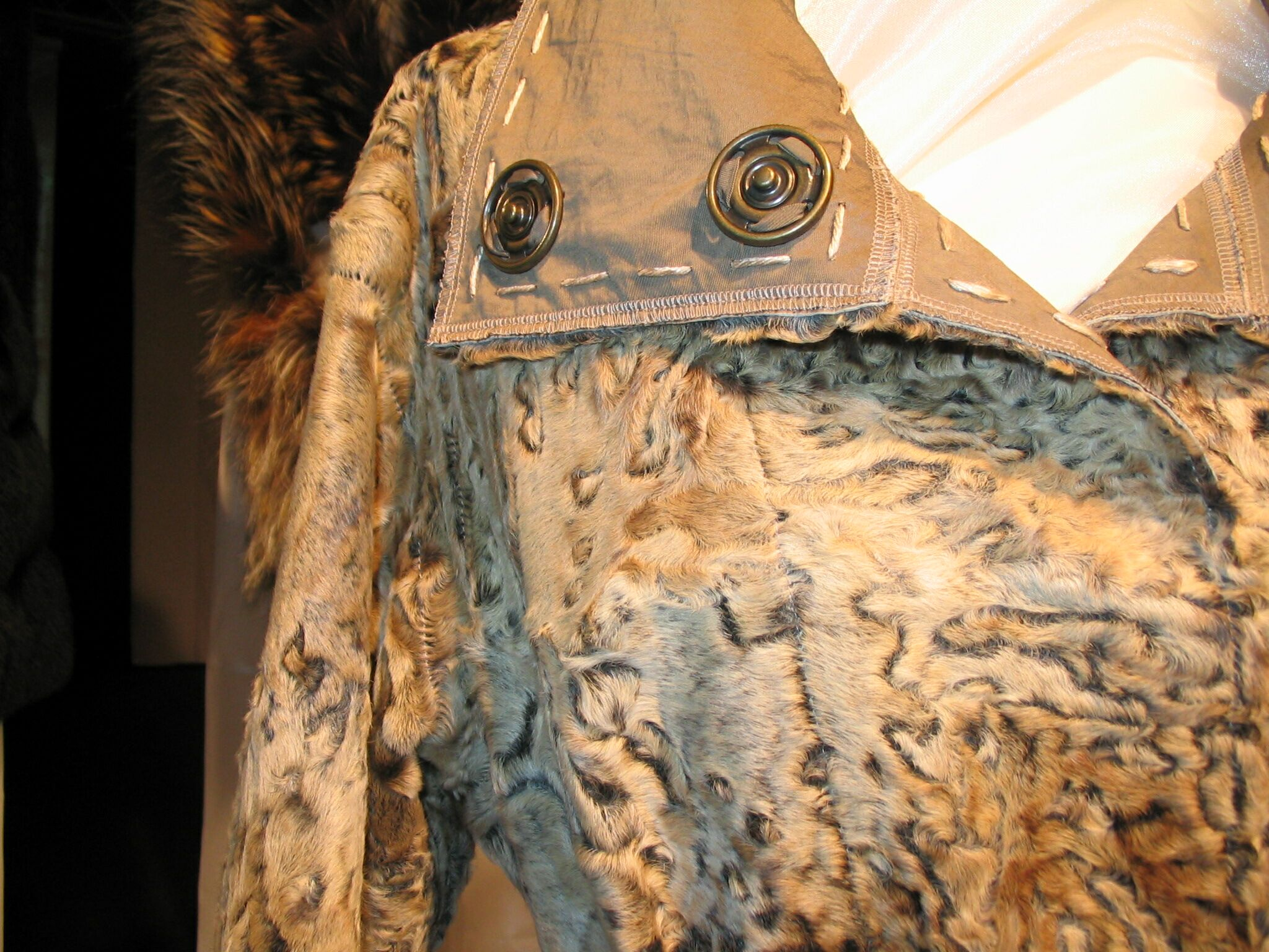 Offenkantige Pelzverarbeitung (Swakara Persianer) mit Drocknöpfen und Handstichen. Gesehen auf der Ausstellung der prämierten Teile des Internationalen Designwettbewerbs des deutschen Kürschnerhandwerks, anlässlich der Pelzmesse in Frankfurt am Main 2008.